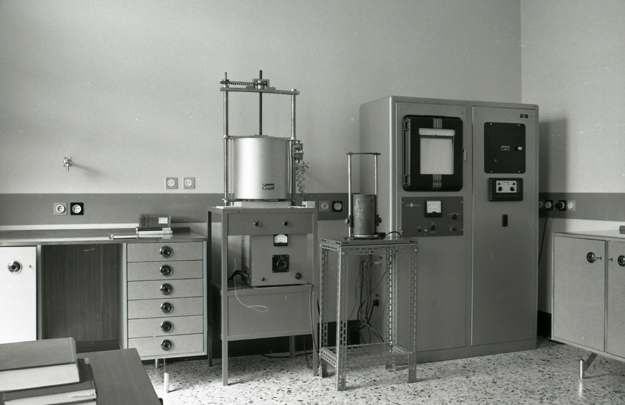 Murano. Centro sperimentale del vetro. Enrico Capuzzo.] Servizio fotografico : Venezia, 1963 / Paolo Monti. - Strisce: 4, Fotogrammi complessivi: 24 : Negativo b/n, gelatina bromuro d'argento/ pellicola ; 35 mm. - ((I fotogrammi hanno una doppia numerazione. . - Sul portanegativi: Leica FP3. - Sul dorso del portanegativi Monti specifica: "vedi 104. Arch. Capuzzo". - Occasione: Documentazione del Centro sperimentale del vetro. - Fonte: Agenda di Paolo Monti: Foto Leica 1 / 1-51 verde, 1-110 nera (1958-1963), presso Archivio Paolo Monti